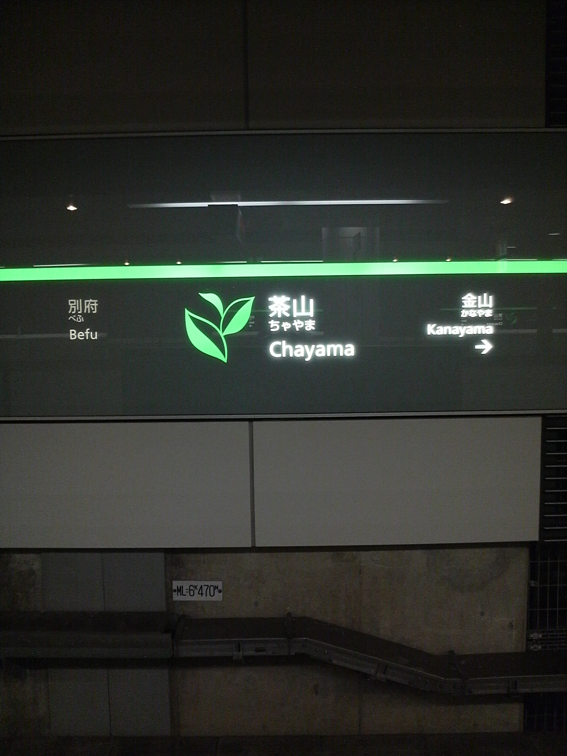 福岡市地下鉄七隈線茶山駅の駅名標